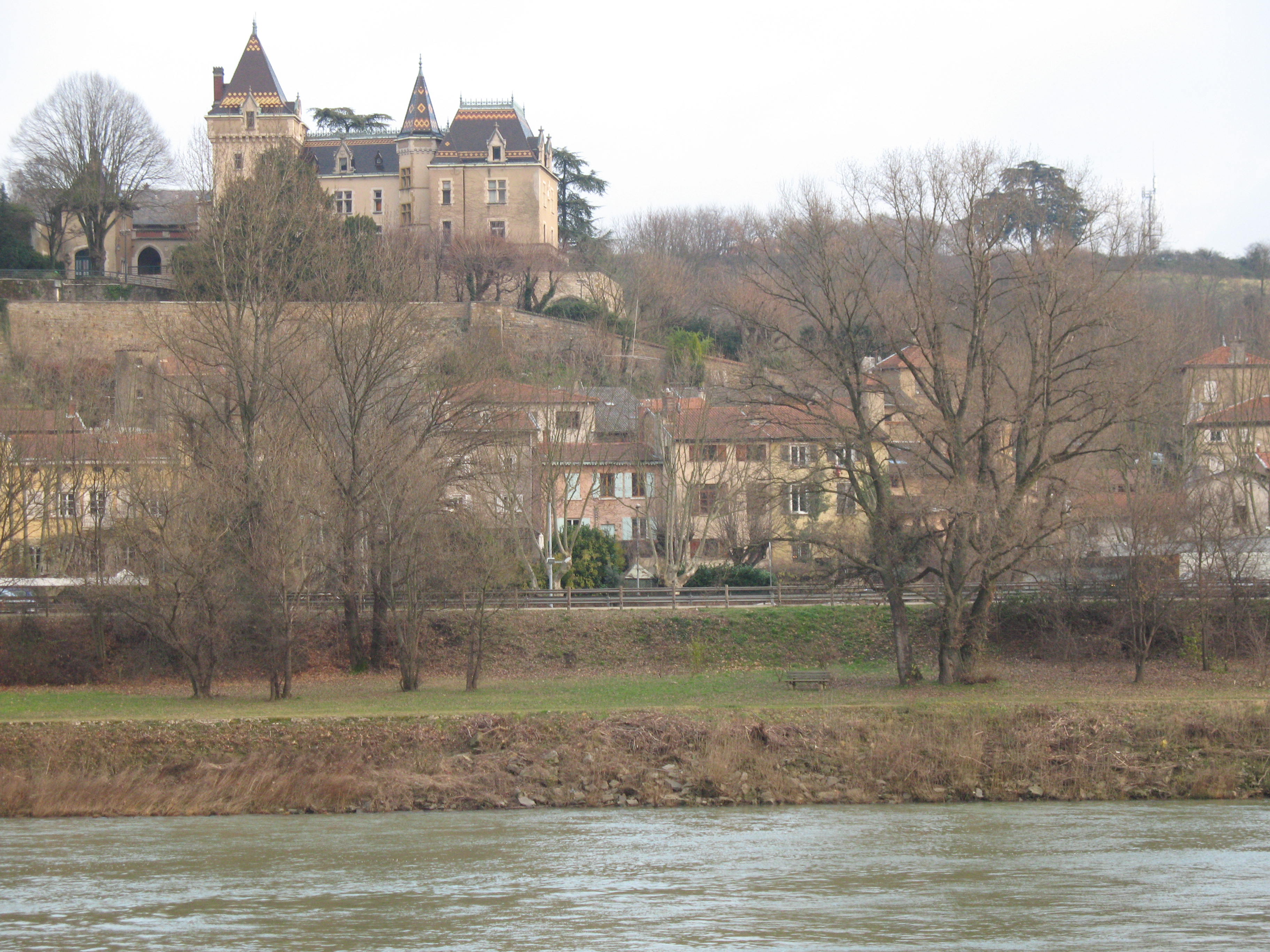 Le château de Rochetaillée-sur-Saône, dans le Rhône, dominant la Saône